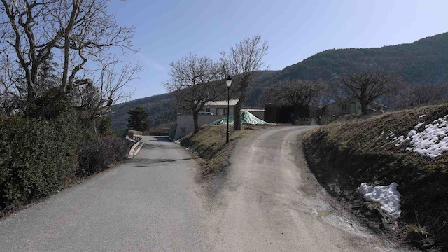 Entrée du village de Pelonne